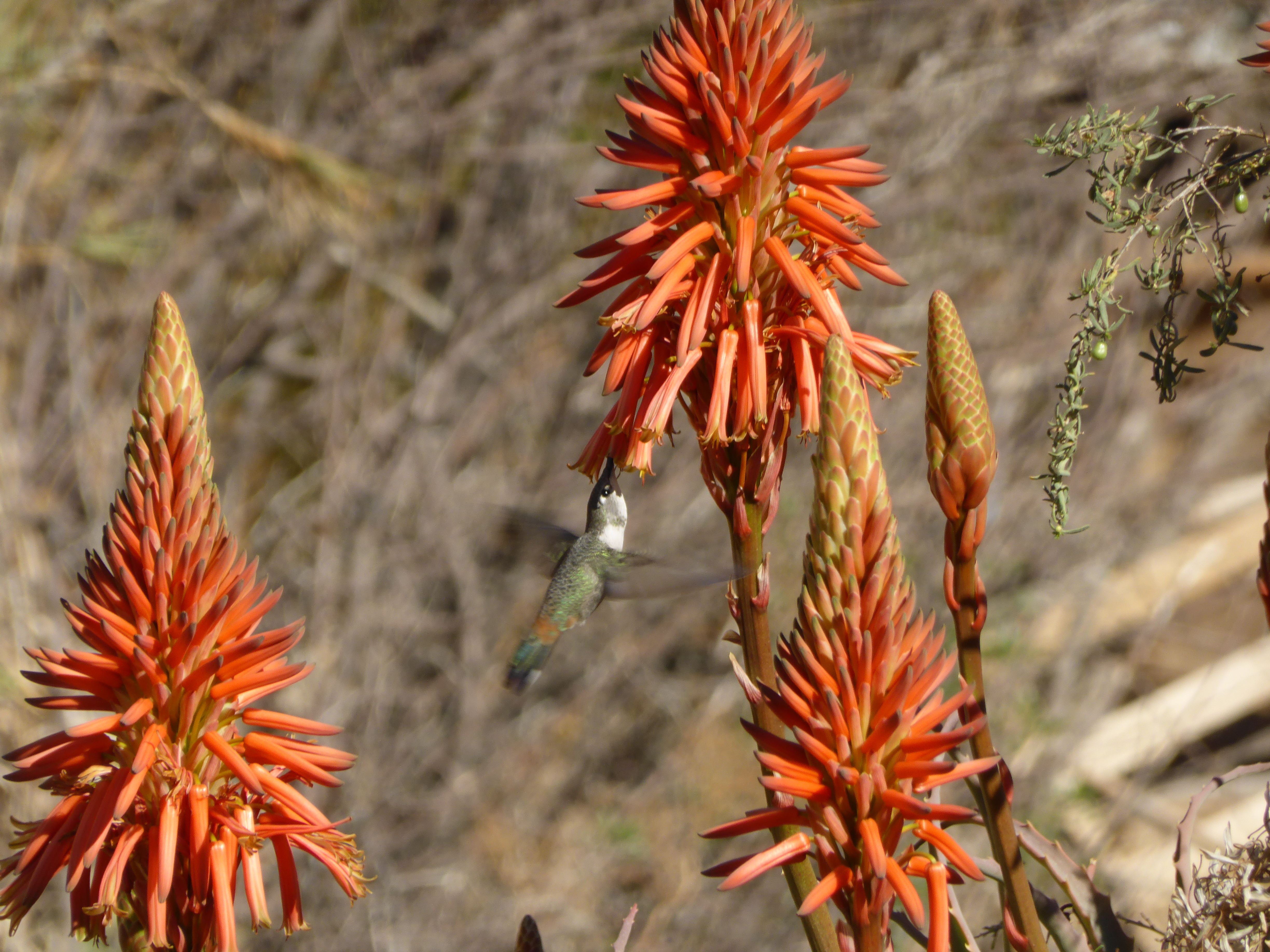 En el pueblo de Pisco Elqui (Chile) vuelan colibríes (aves de la familia Trochilinae). Ampliando la imagen, se puede ver un colibrí libando, picando o chupando una flor de una inflorescencia de un aloe o sábila .